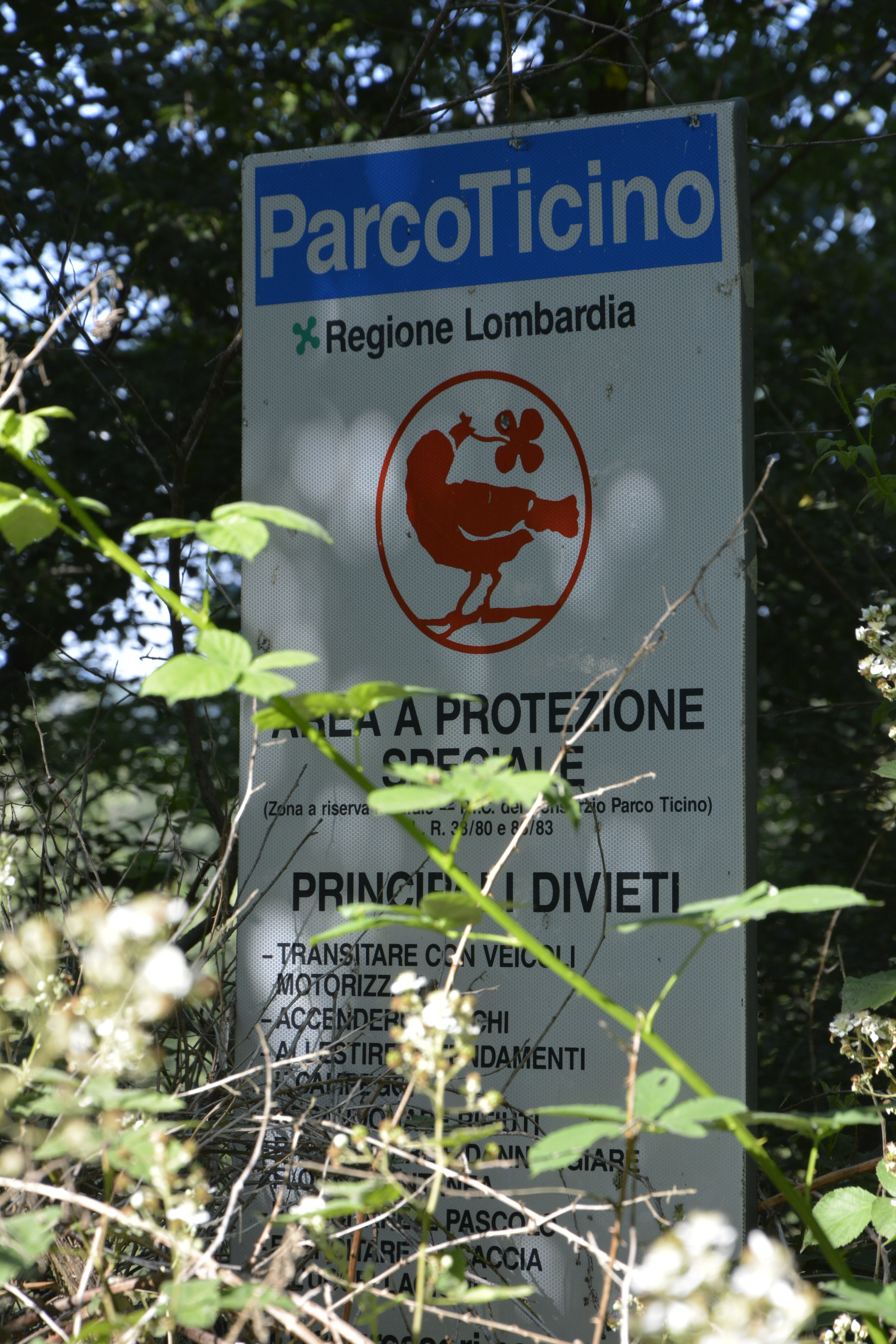 L'Ansa di Castelnovate (Q55581281), sito di interesse comunitario sulla sponda lombarda del fiume Ticino, nel comune di Vizzola Ticino